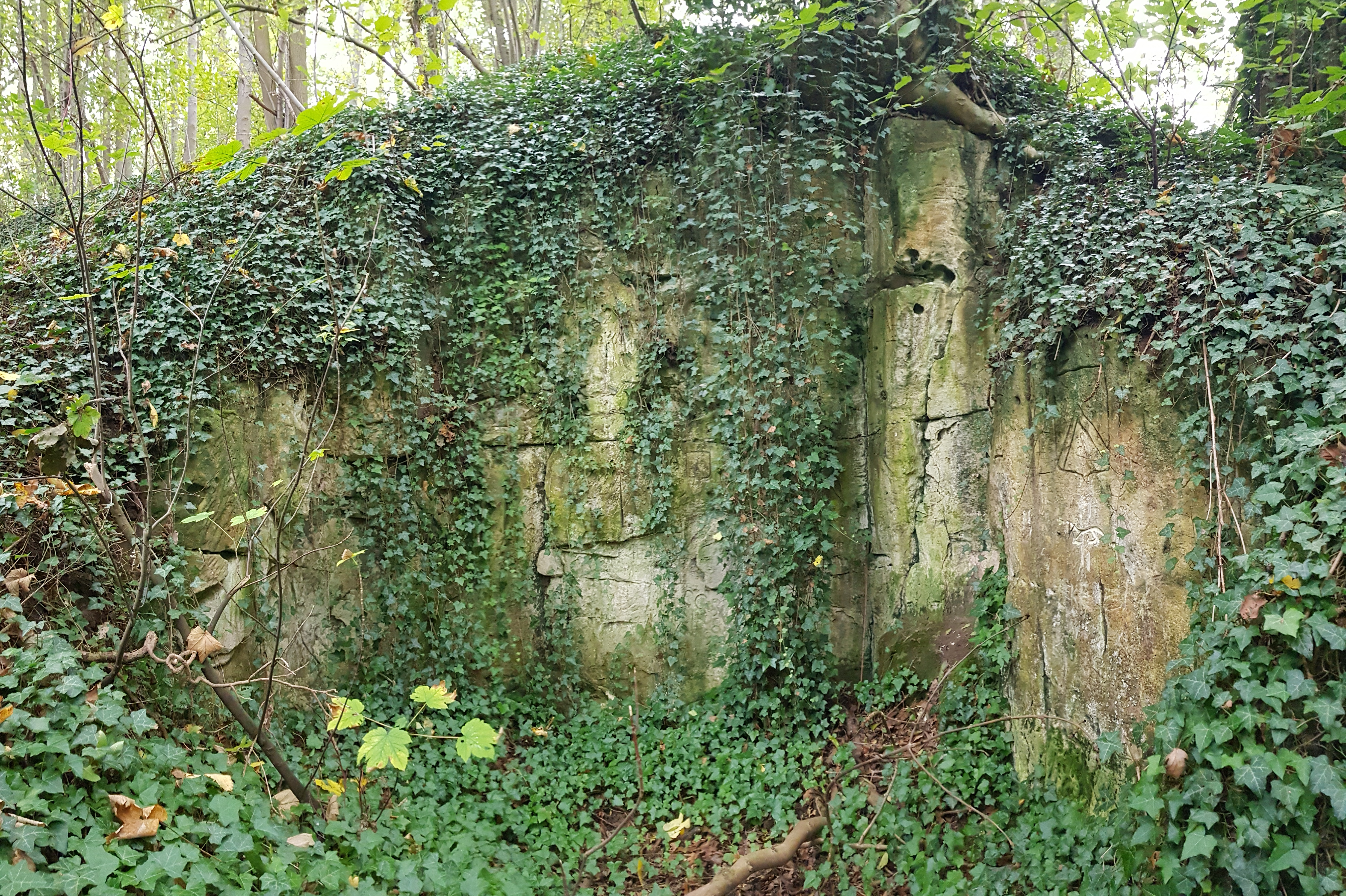 Sint-Jansboschgroeve II, Oud-Valkenburg, Nederland